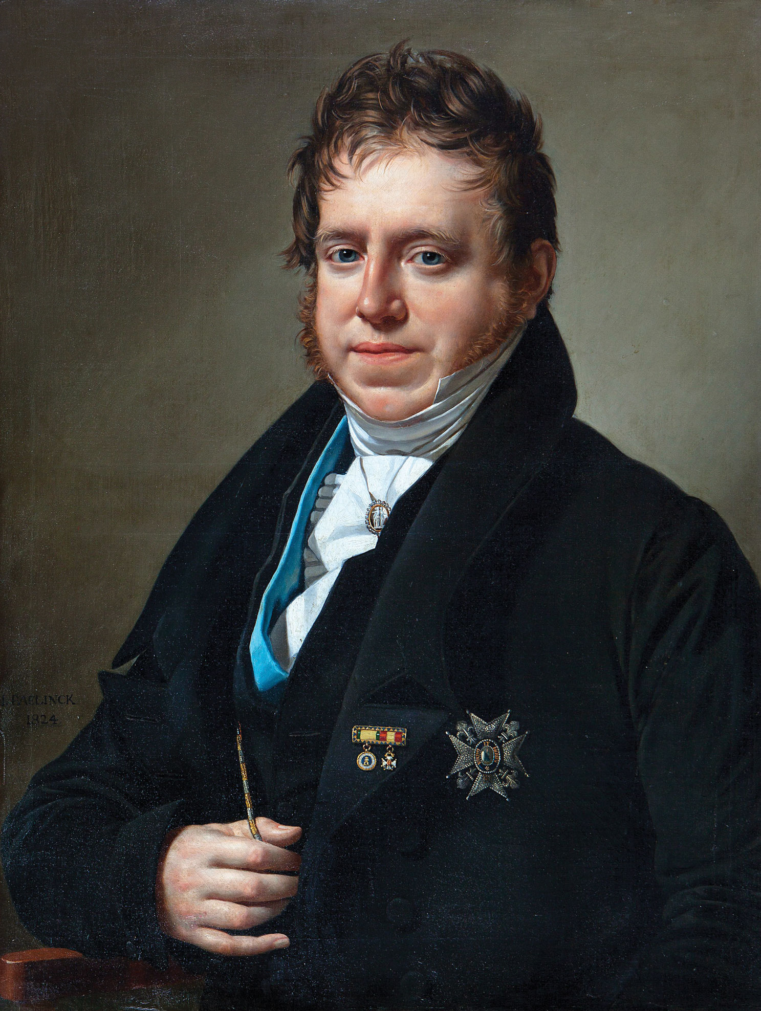 Retrato del segundo duque de San Lorenzo de Valhermoso, Lorenzo Justino Fernández de Villavicencio y Núñez de Villavicencio.